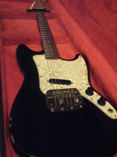 Fender Bronco